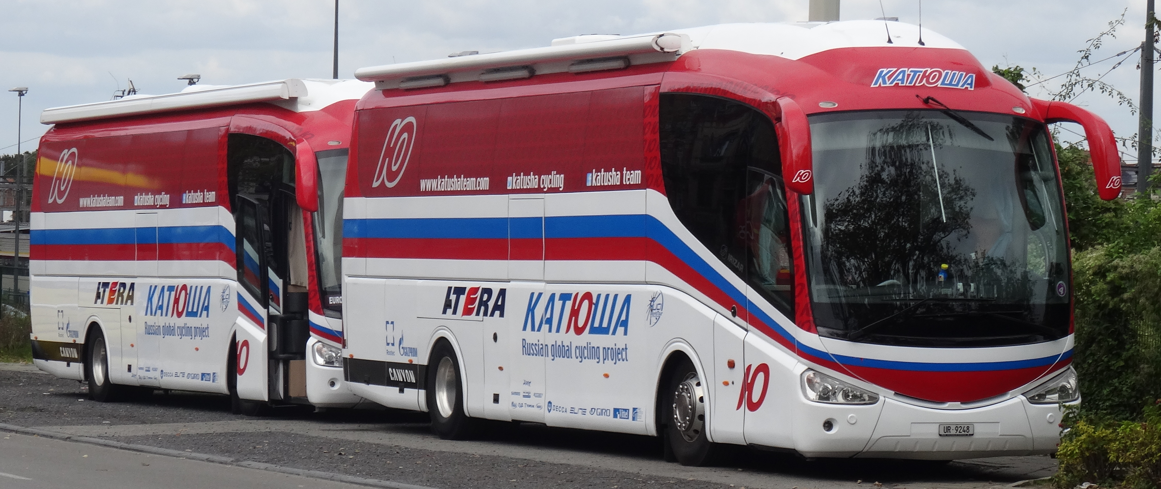 Reportage photographique réalisé le dimanche 5 octobre à l'occasion de l'arrivée de la quatrième étape de l'Eurométropole Tour 2014 à Tournai, Belgique.